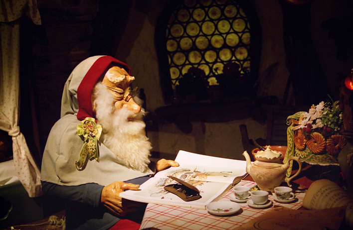 Efteling, Sprookjesbos